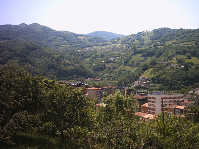 Pueblo de Blimea, al fondo se ve el valle de San Mamés